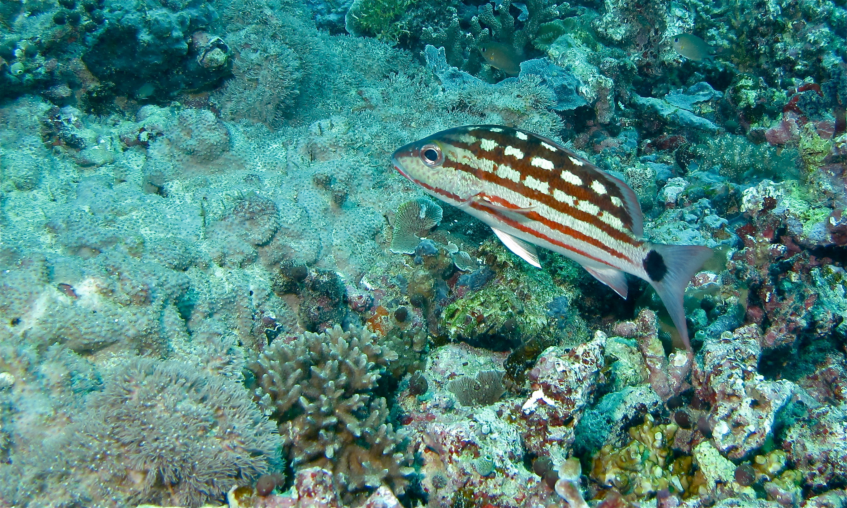 South Point, Sipadan, Sabah, MALAYSIA